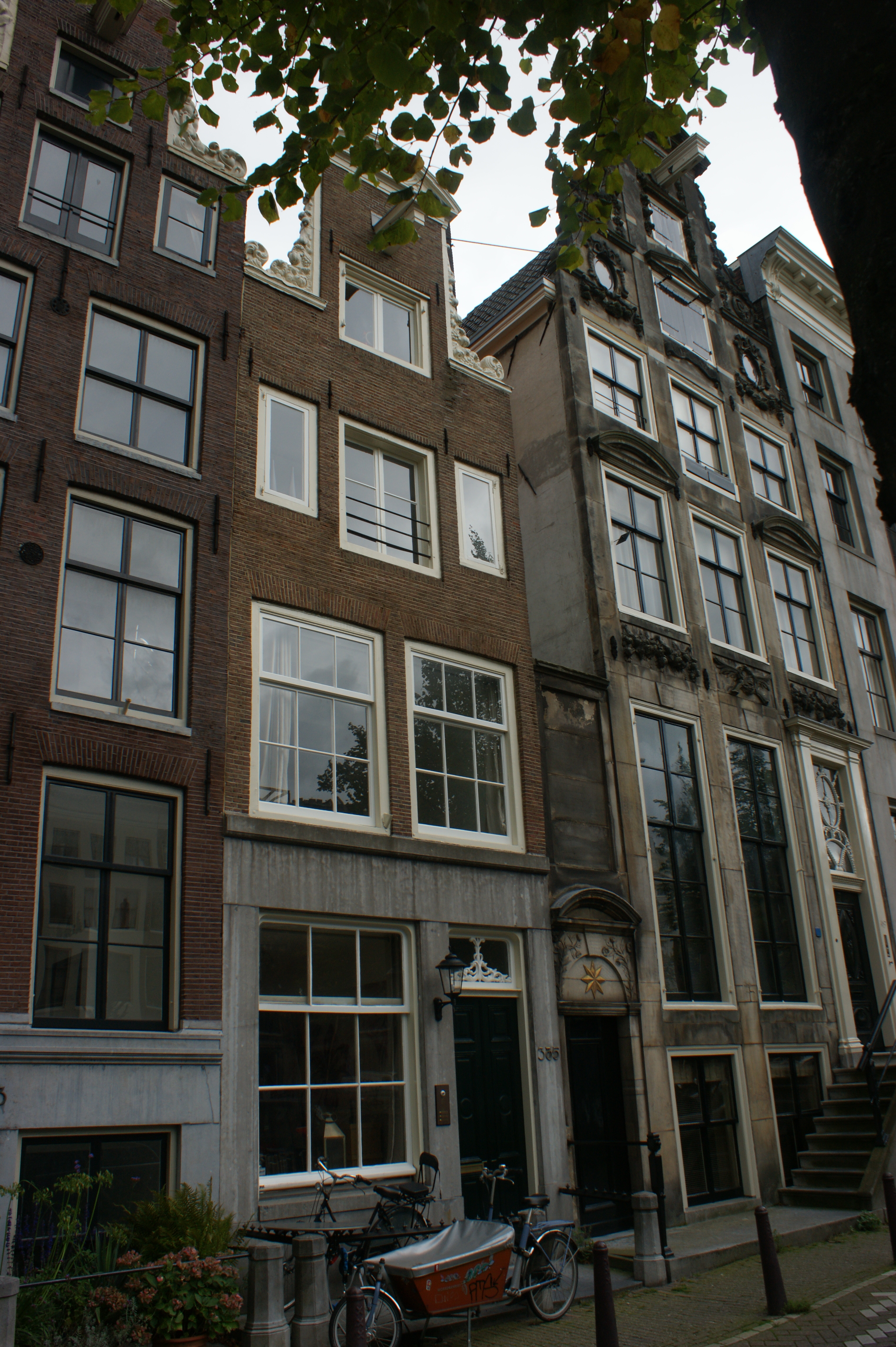 Amsterdam, Keizersgracht